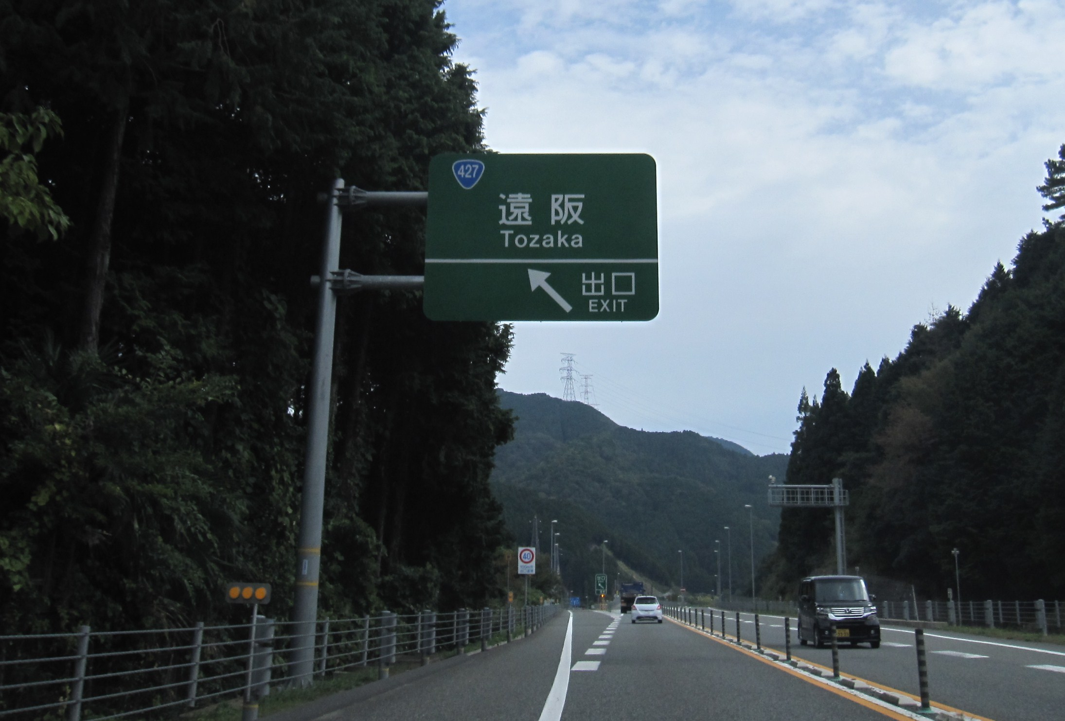 遠阪ランプ案内板